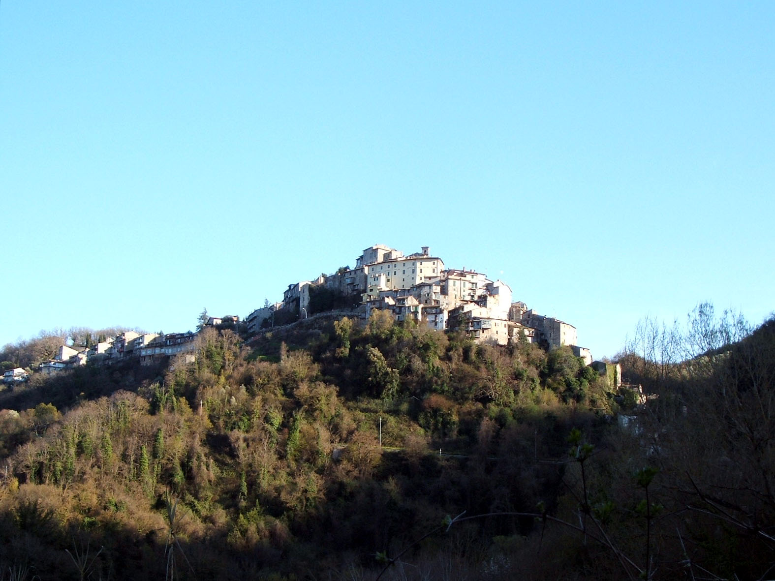 Anticoli Corrado, Valle dell'Aniene RM